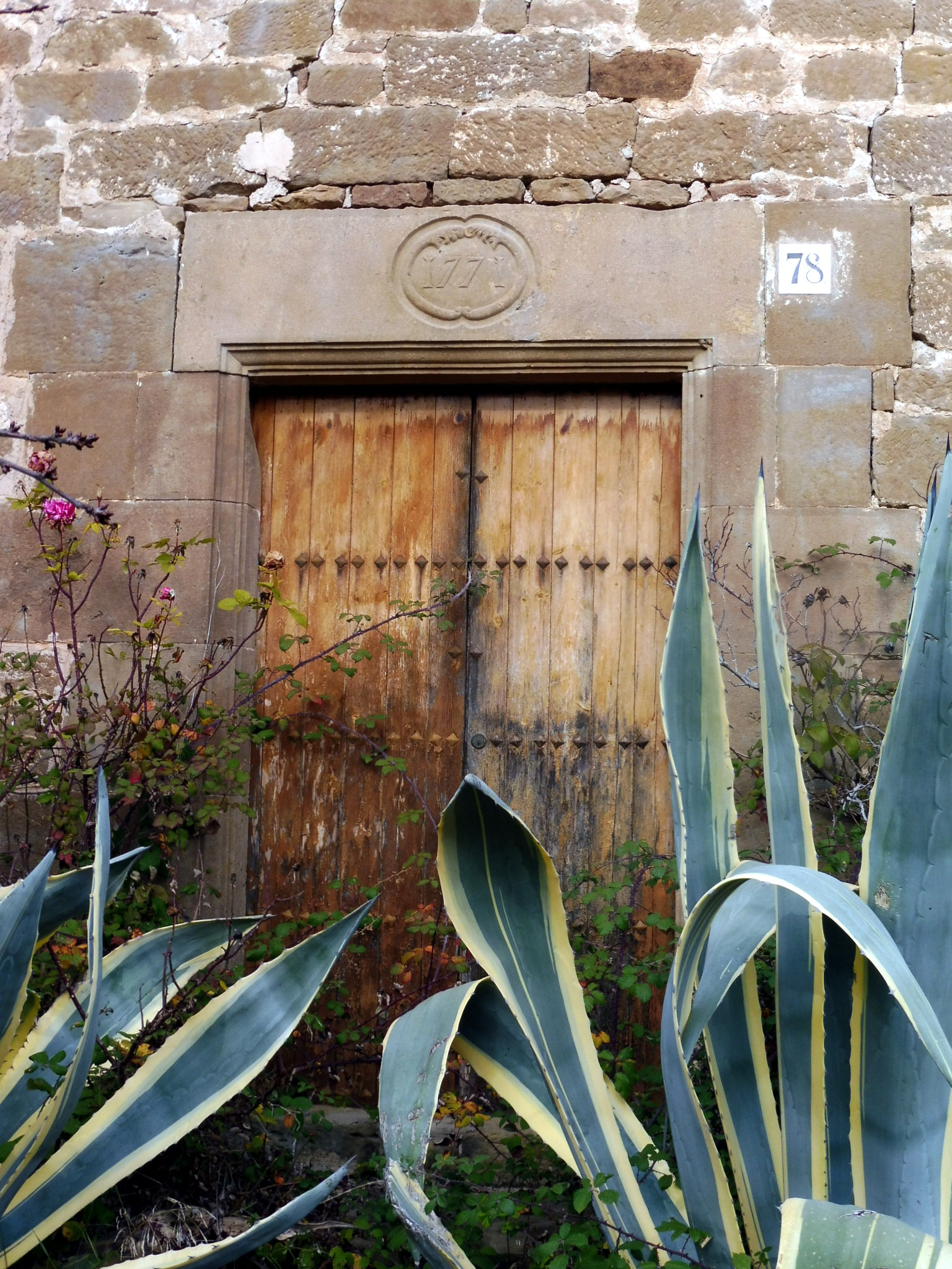 Església de Sant Martí de Vilapedrers (Navès): portal